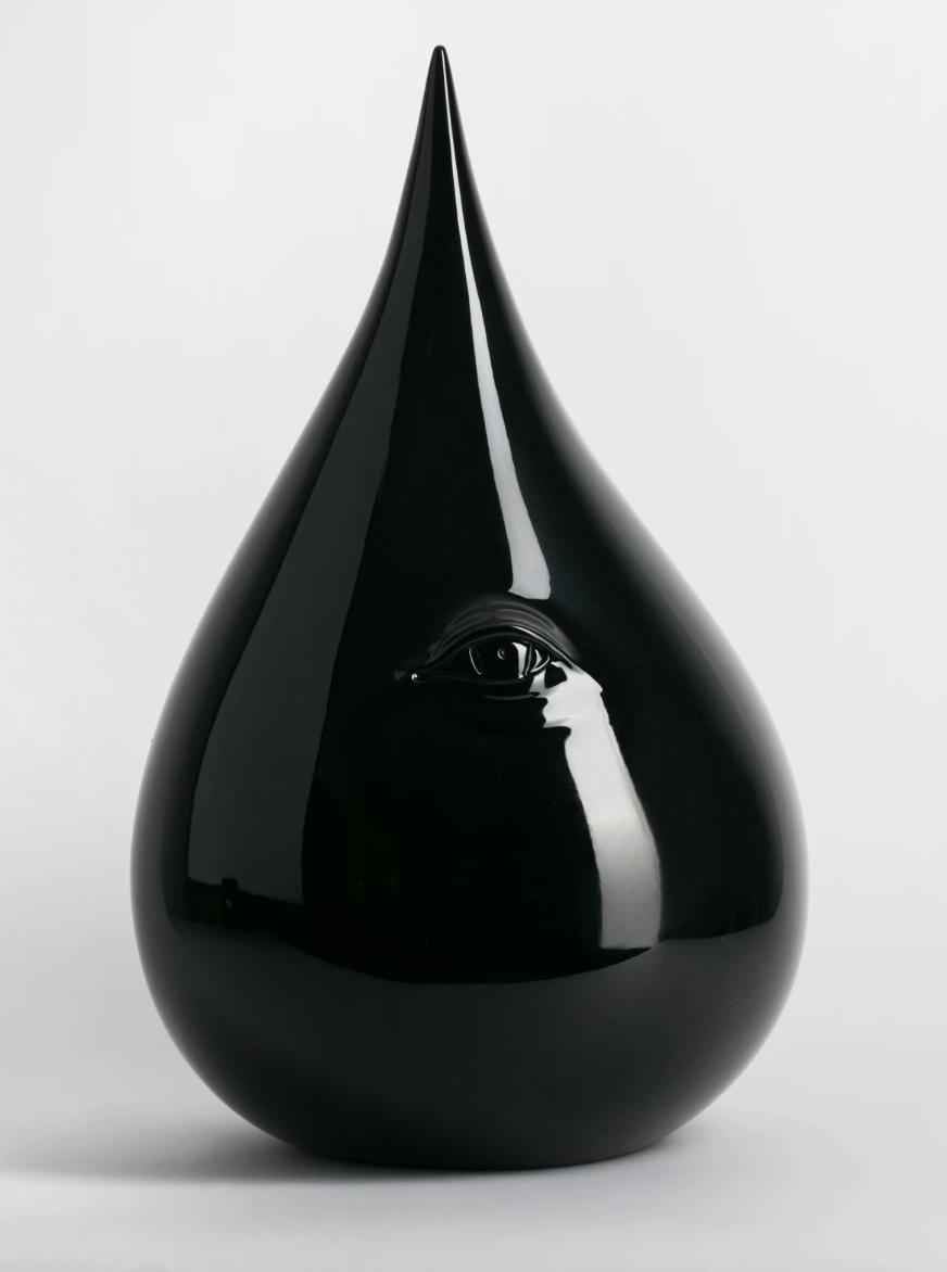 Ресурсы (Нефть) 2016. Полиэфирная смола, автоэмаль 55x55x45 см.